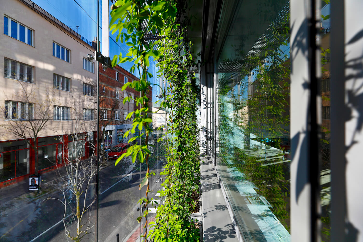 Budova Wallenrod vertikálna zelená fasáda